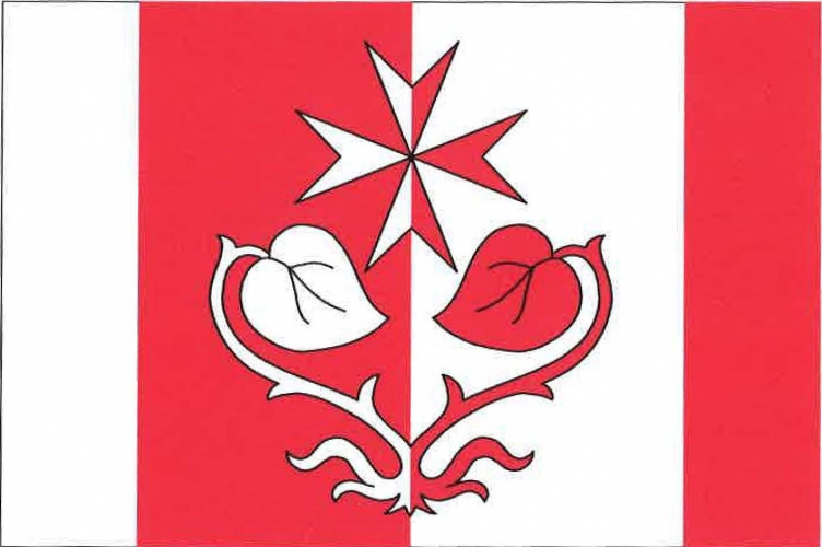 vlajka, Zdětín, okres Mladá Boleslav